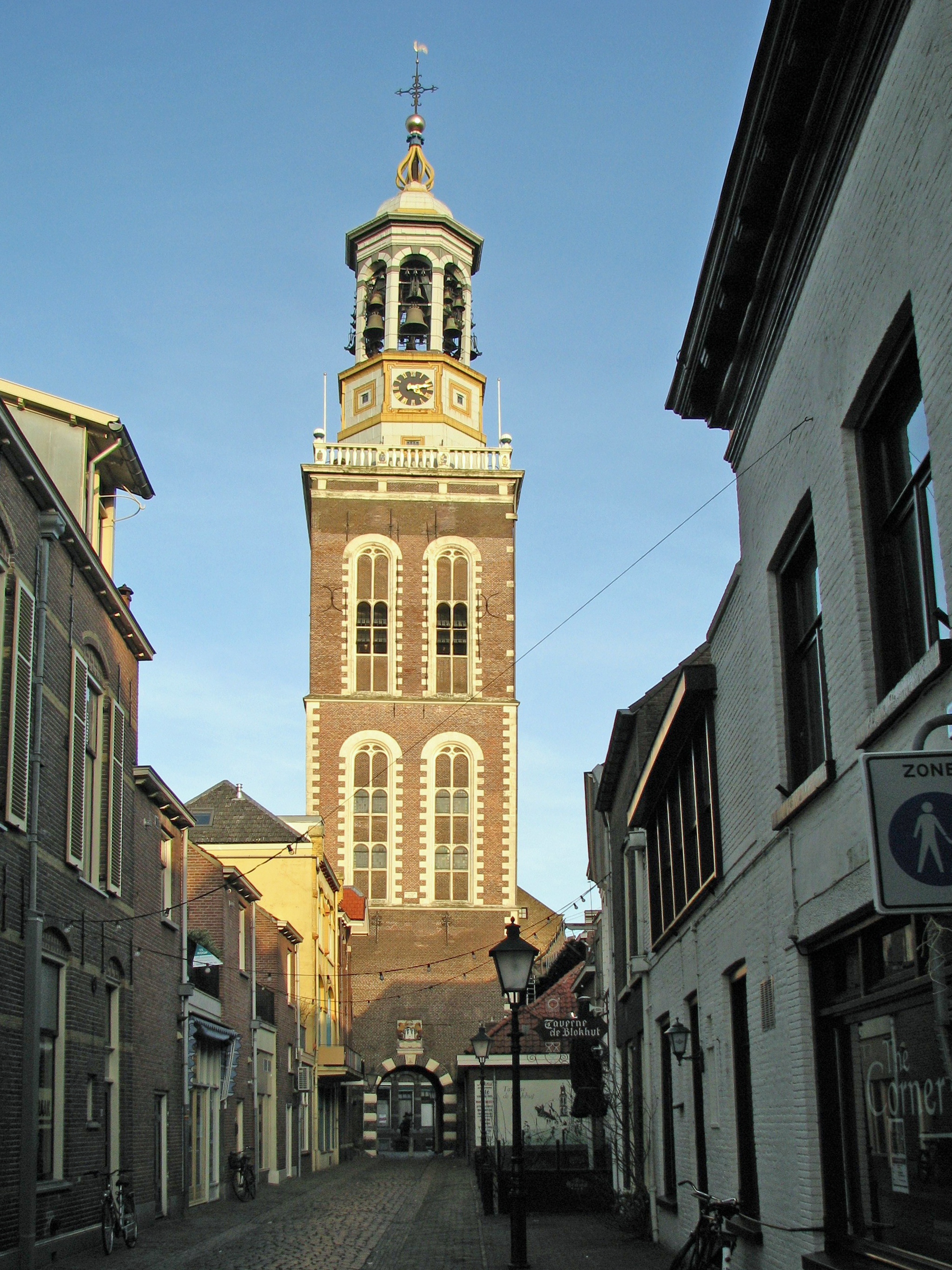 Nieuwe Toren, Kampen Situatie voor 2008